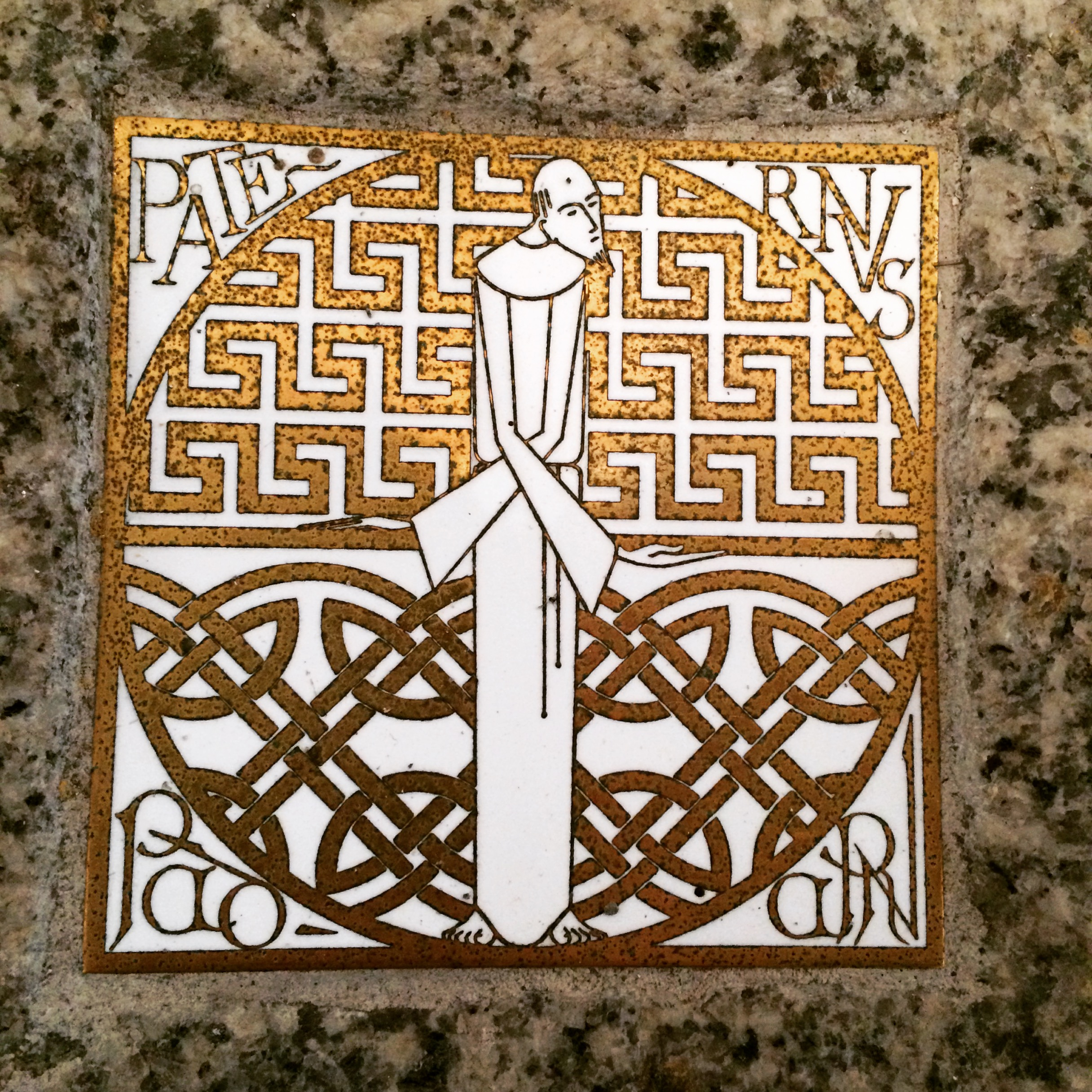 Darlun o Sant Padarn, Eglwys Llanbadarn Fawr.